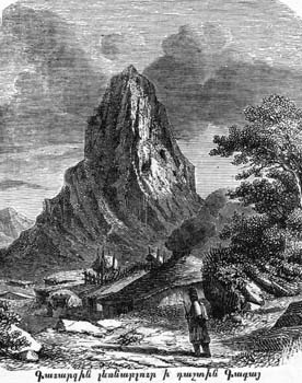 Армянская крепость Гавазан на открытке начала 20 века. На ней написано: «Գավարզին լեռնաբլուր ի դաշտին Գագայ», что означает «Крепость Гаварзин в долине Гага»